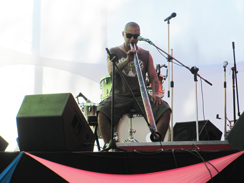 Mack Yidhaky en concierto.